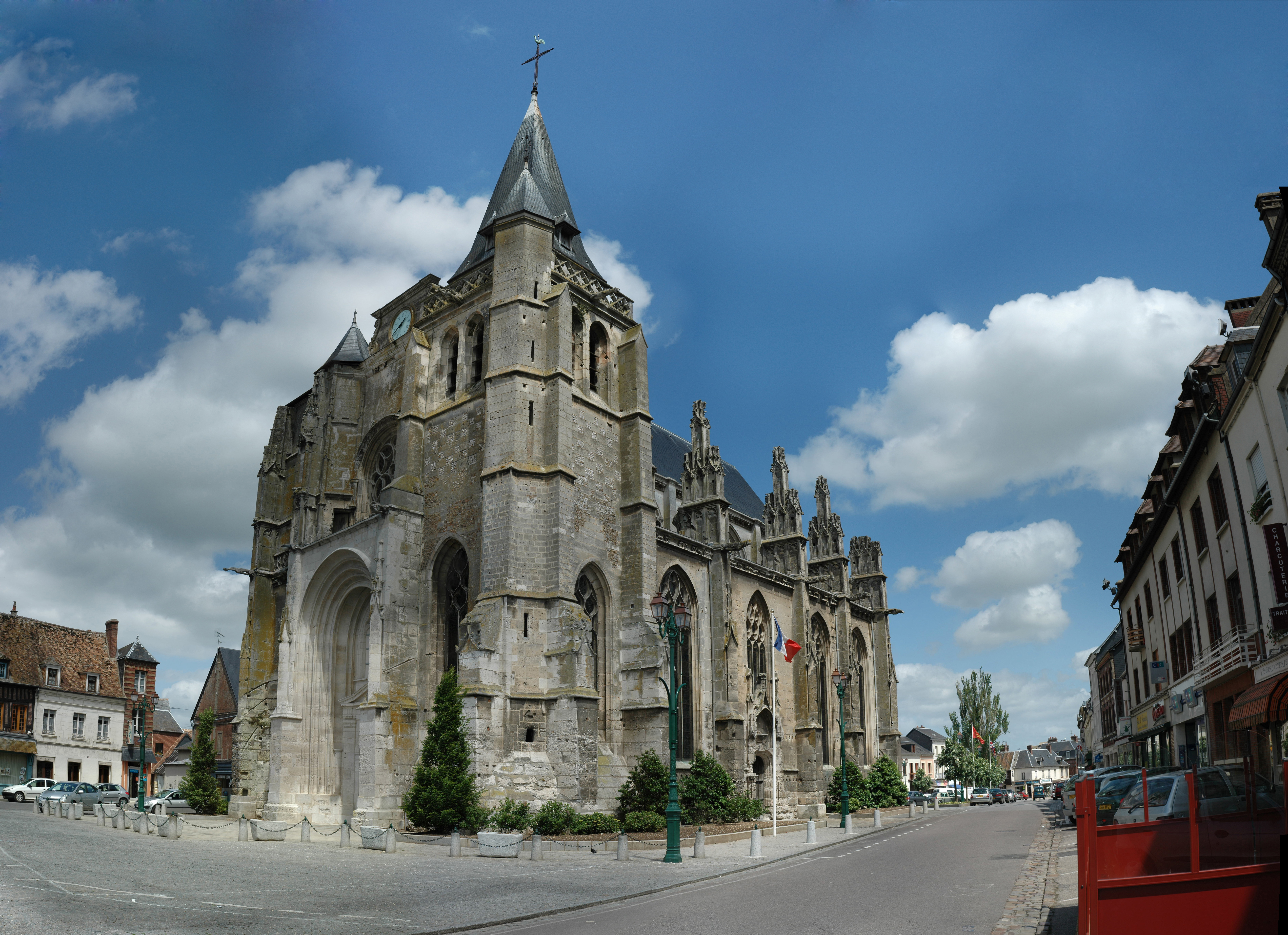 Église Saint-Pierre-et-Saint-Paul du Neubourg